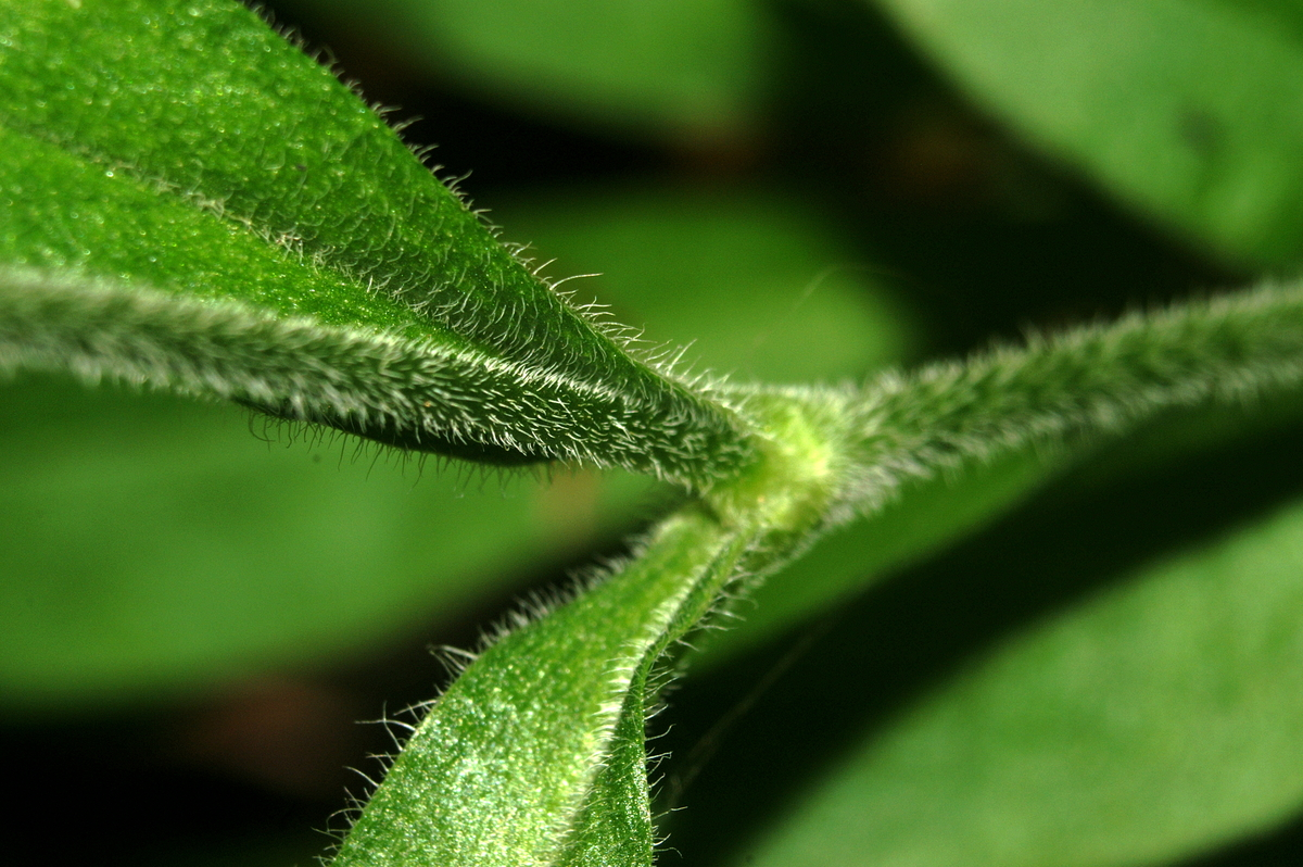 Kimasta lepnica v Polhovem Gradcu